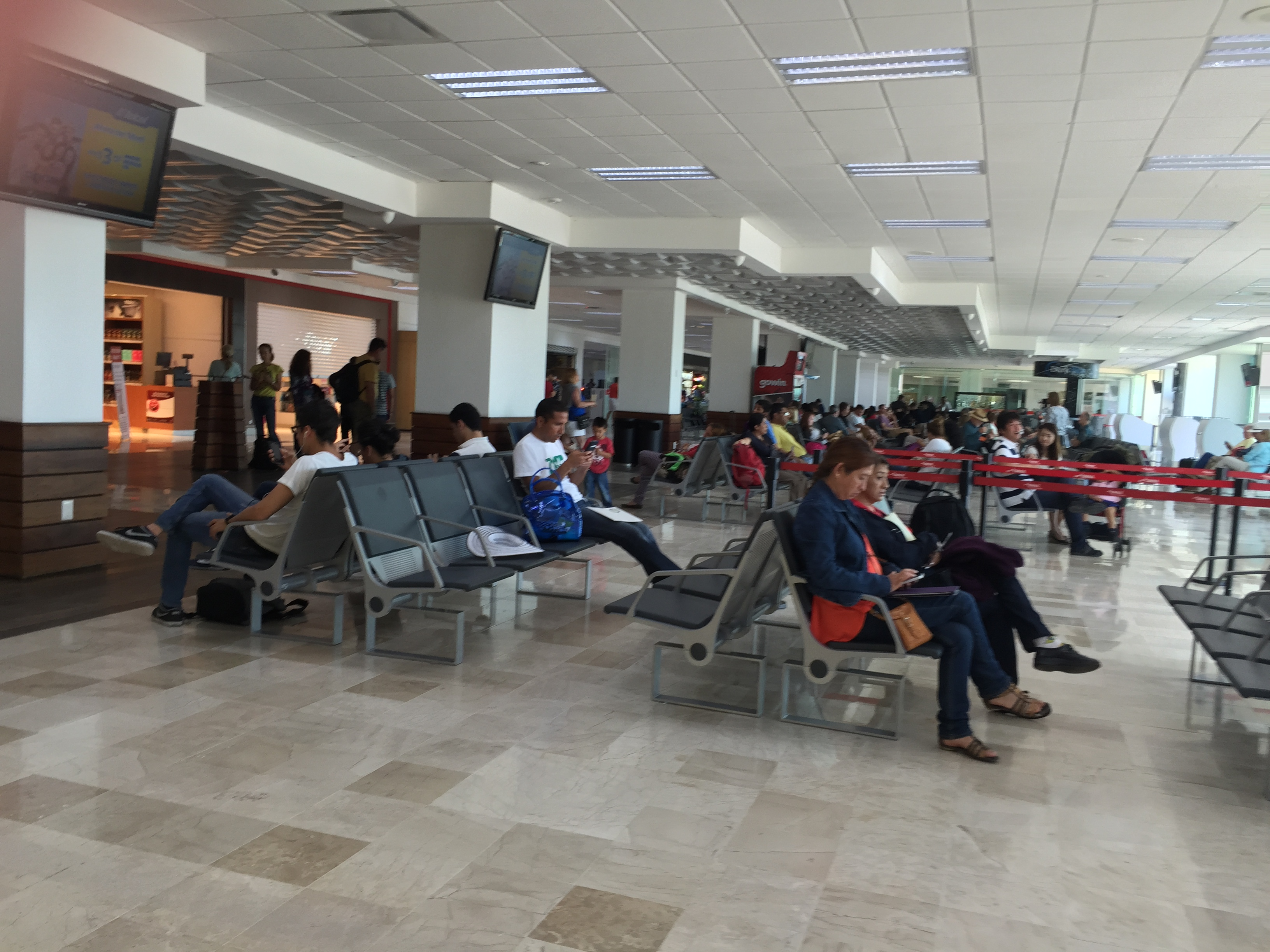 Sala de última espera del Aeropuerto de Ixtapa-Zihuatanejo.